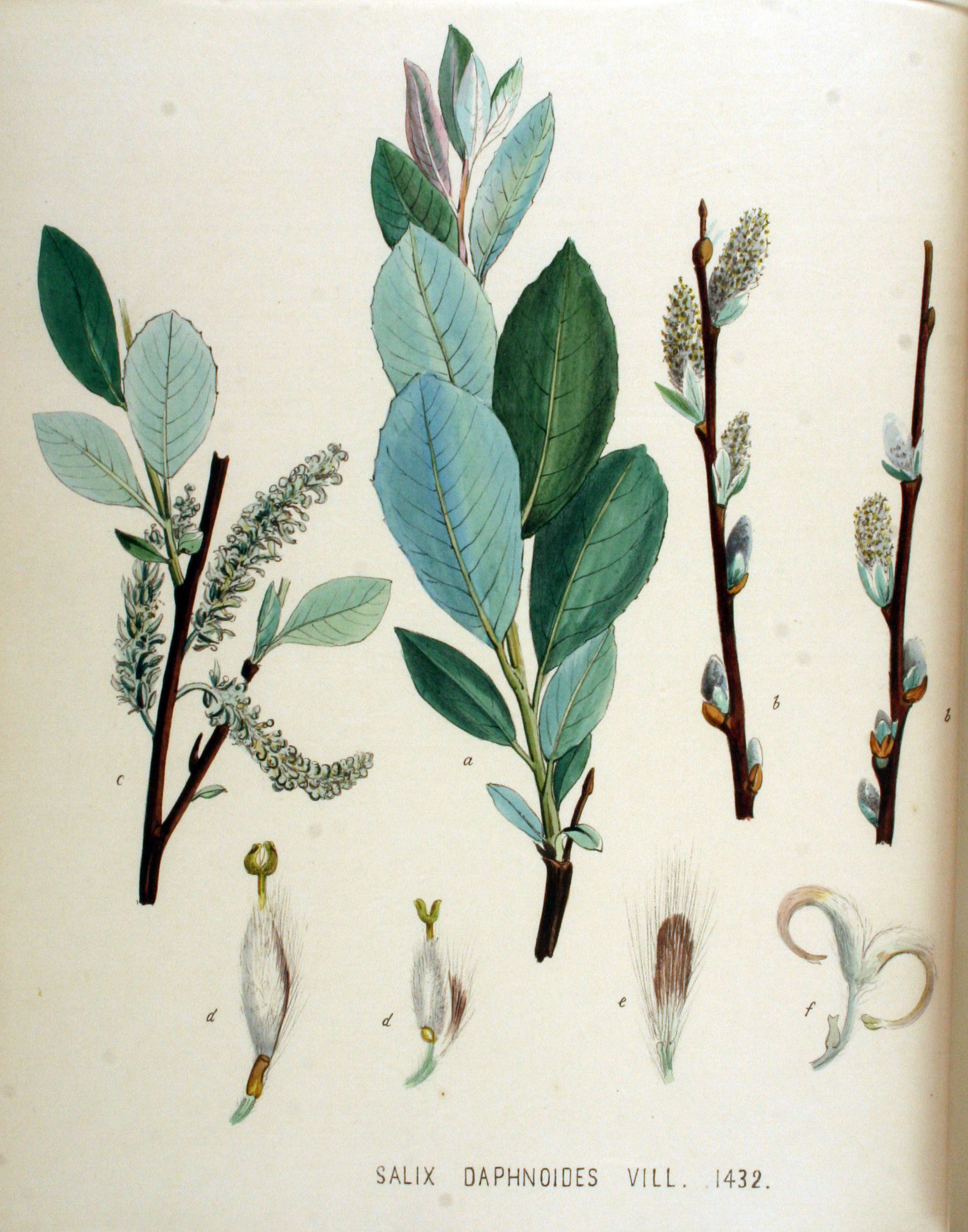 Salix daphnoides Vill.